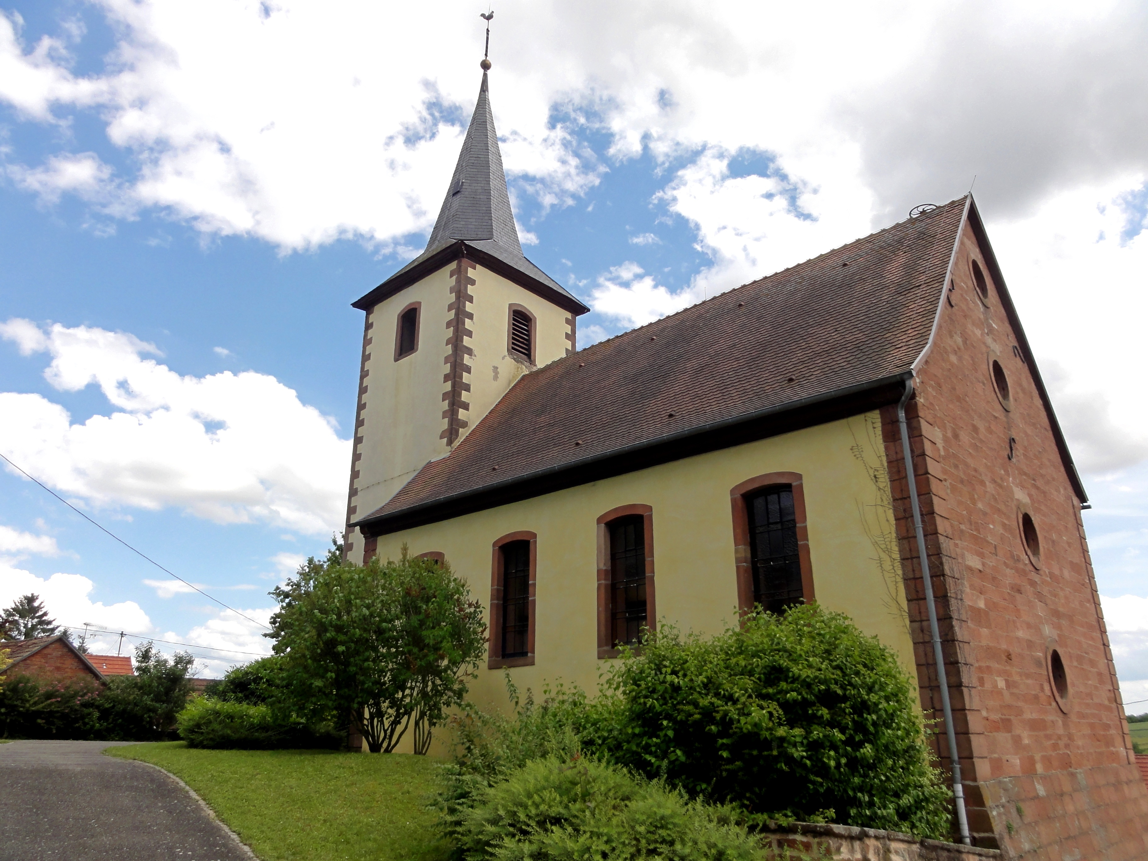 Alsace, Bas-Rhin, Schalkendorf, Église protestante (1774)